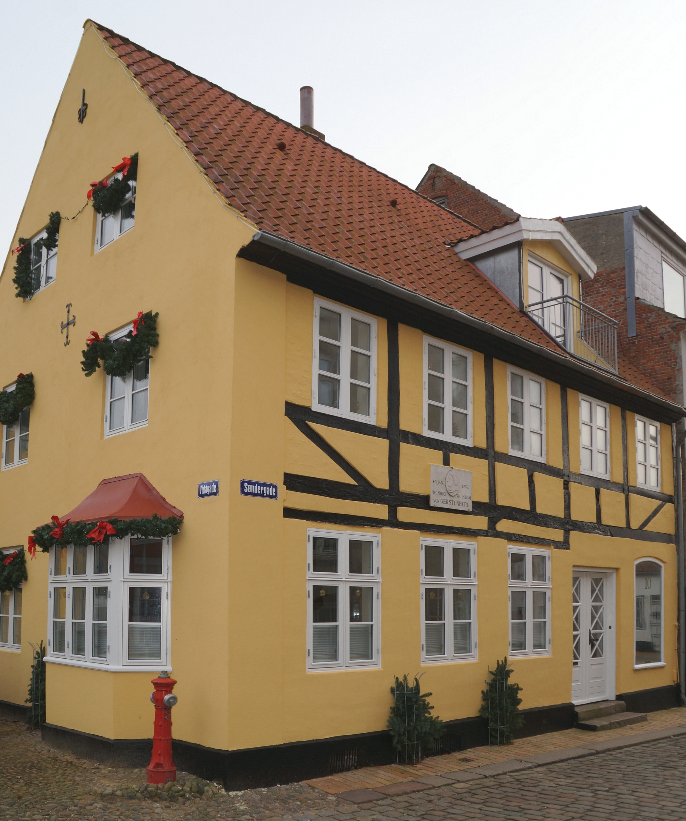 Das Geburtshaus von Heinrich Wilhelm von Gerstenberg (geb. 3. Januar 1737), Søndergade, Tønder, Sønderjylland, Danmark. Foto Wolfgang Pehlemann DSC00620